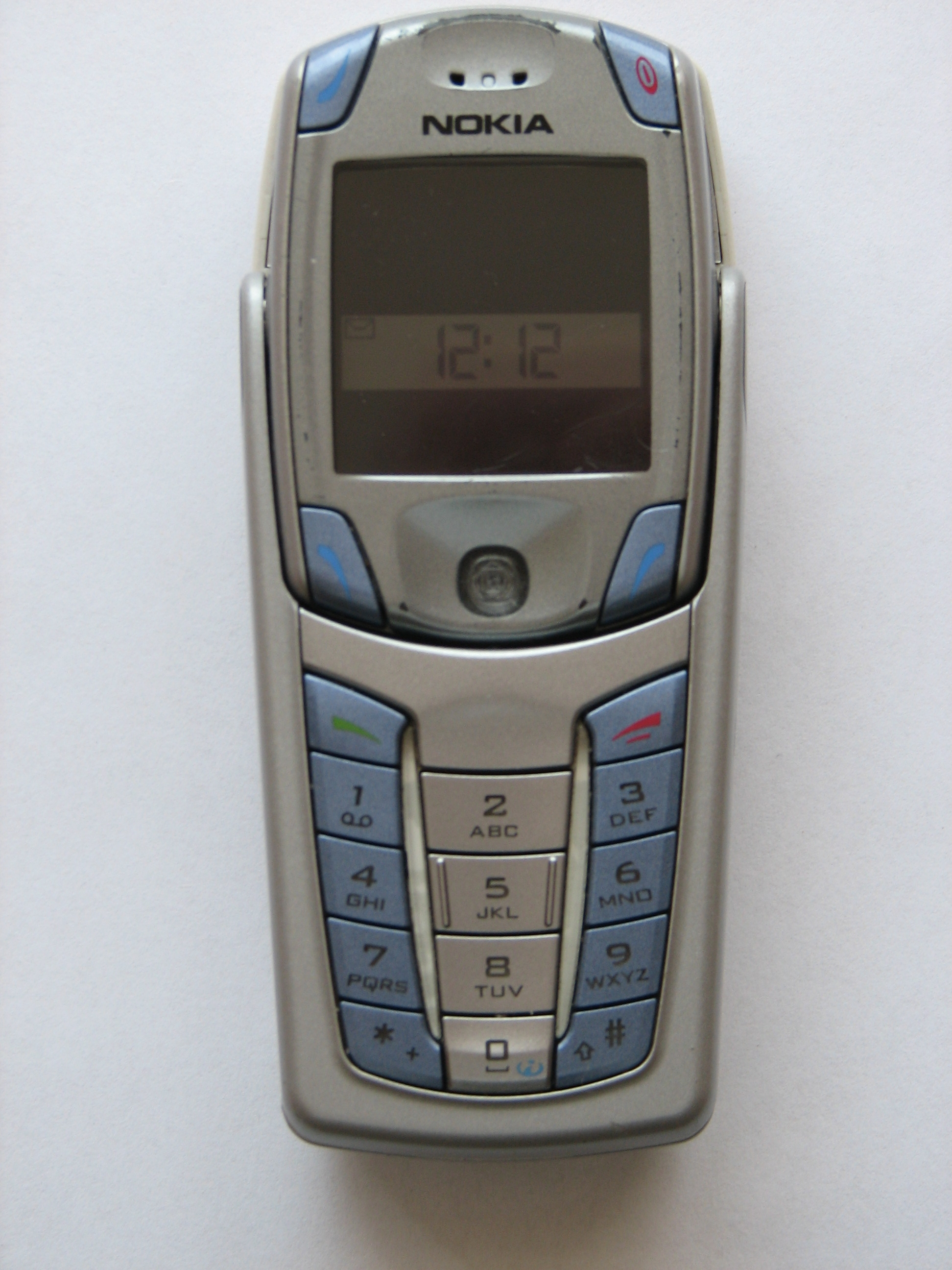 Nokia 6820